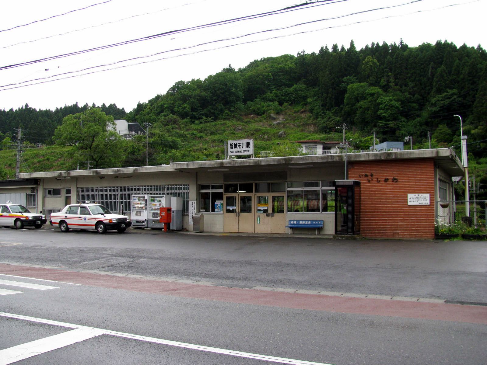 水郡線磐城石川駅